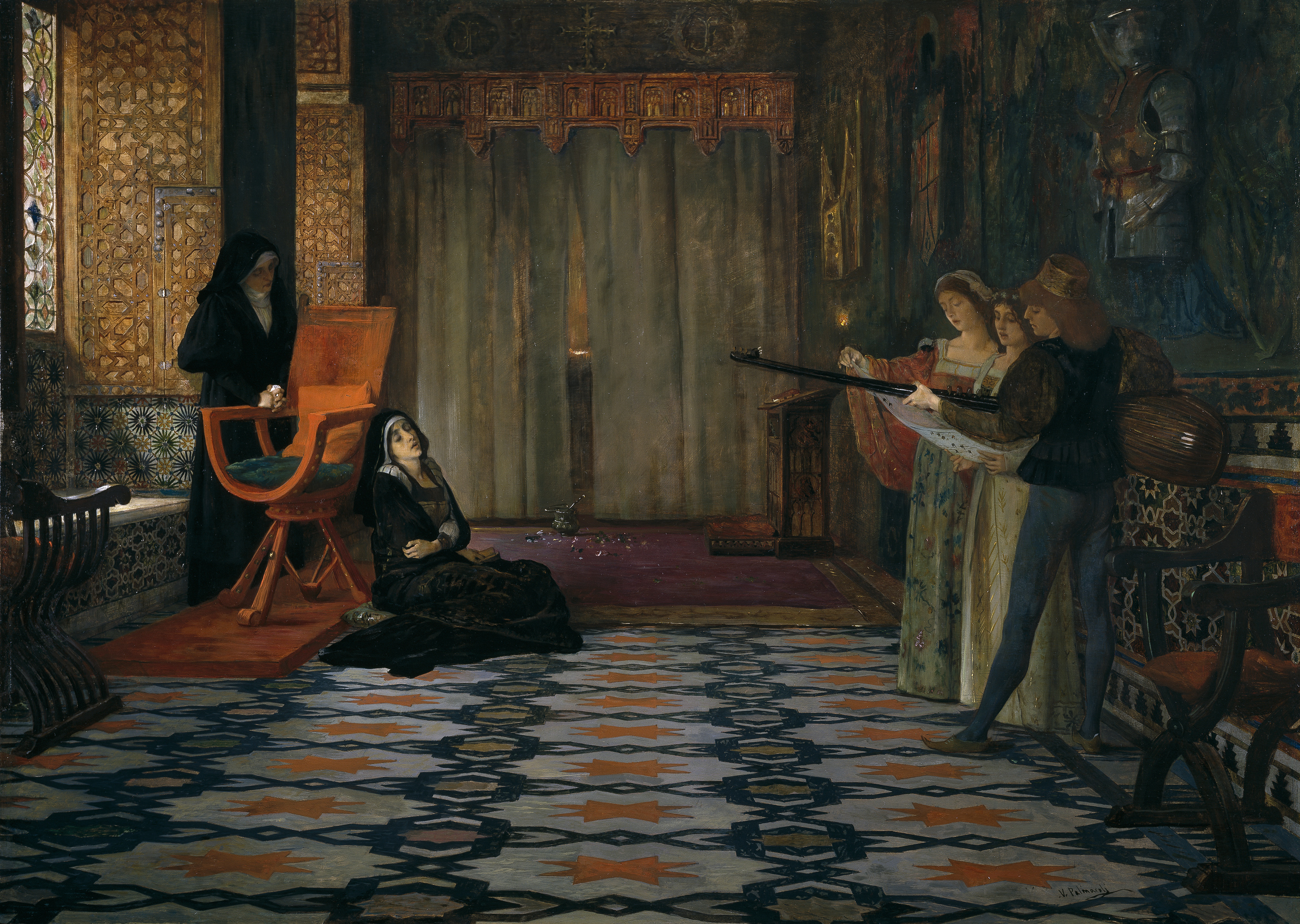 El lienzo representa a dos mujeres cantando ante la reina Juana I de Castilla (1479-1555), que era conocida como la Loca y permaneció recluida en el municipio vallisoletano de Tordesillas durante varias décadas hasta que falleció.